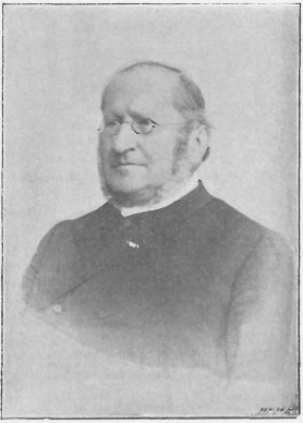 Hornjoserbsce: Serbski ewangelski duchowny a narodny prócowar Jaroměr Hendrich Imiš.